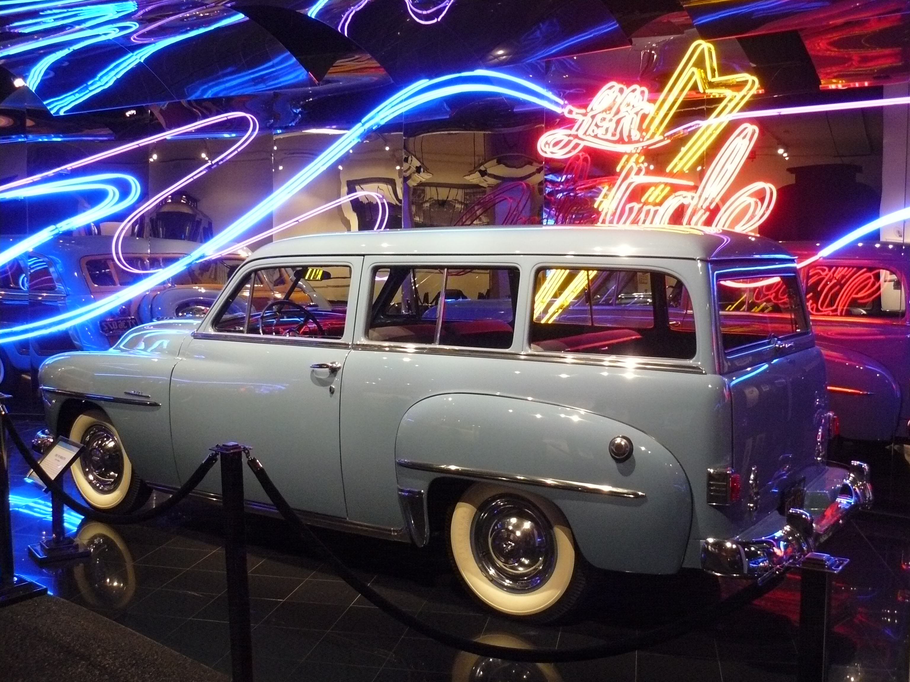 Musée Petersen 2012